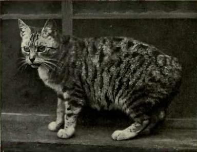 Manx Tabby